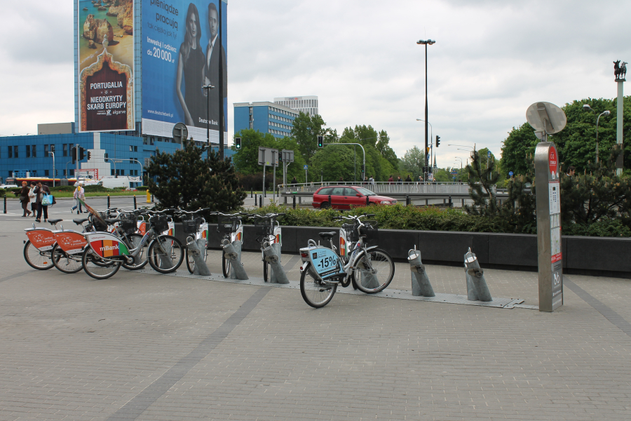 Stacja Veturilo przy południowo-zachodnim wyjściu ze stacji metra A11 Politechnika.